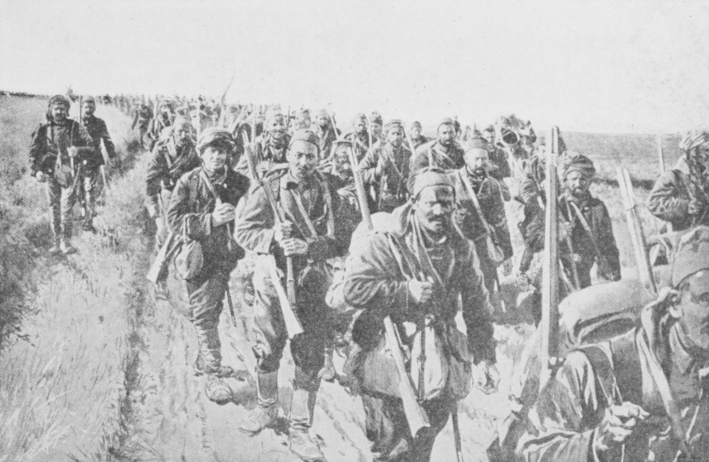 Tropas serbias marchando al frente, Primera Guerra Mundial.